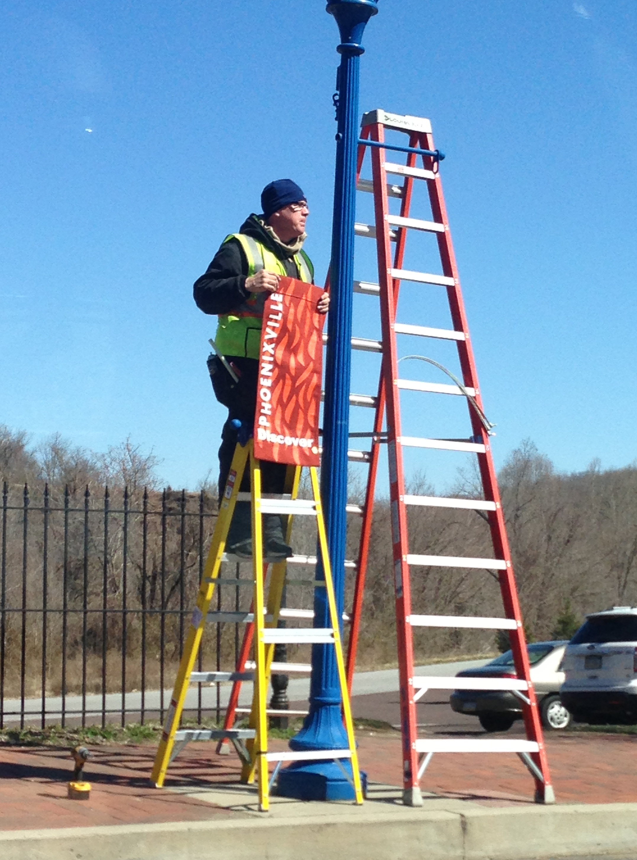 Украшение улиц в предшествии Первой Пятницы